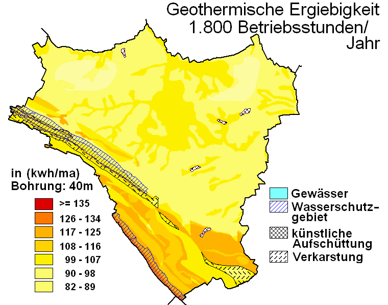 geothermische Karte Werther(Westfalen)